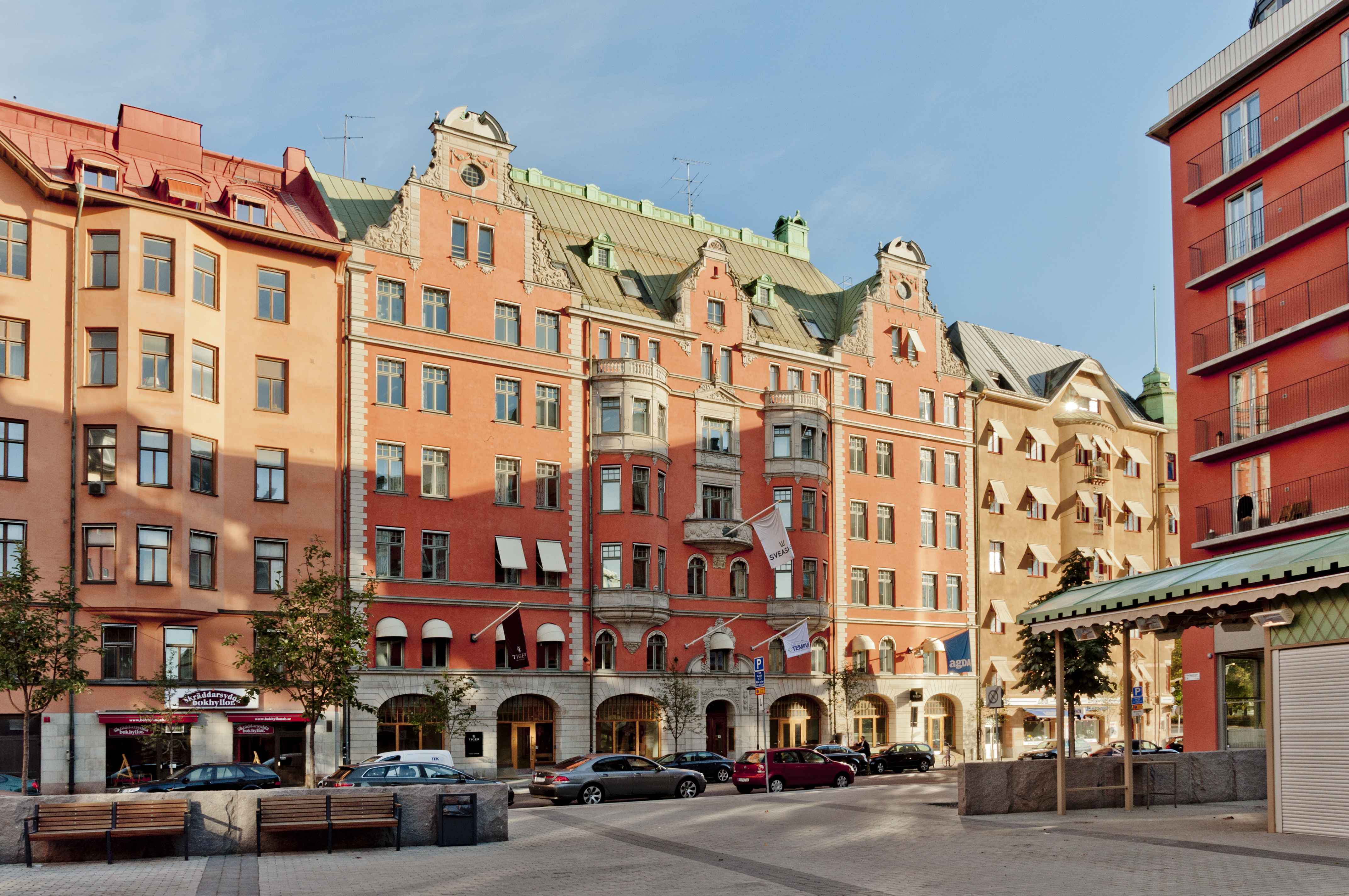 Byggnadsår 1906-09, arkitekt Dorph & Höög, byggherre och byggmästare P Nilsson